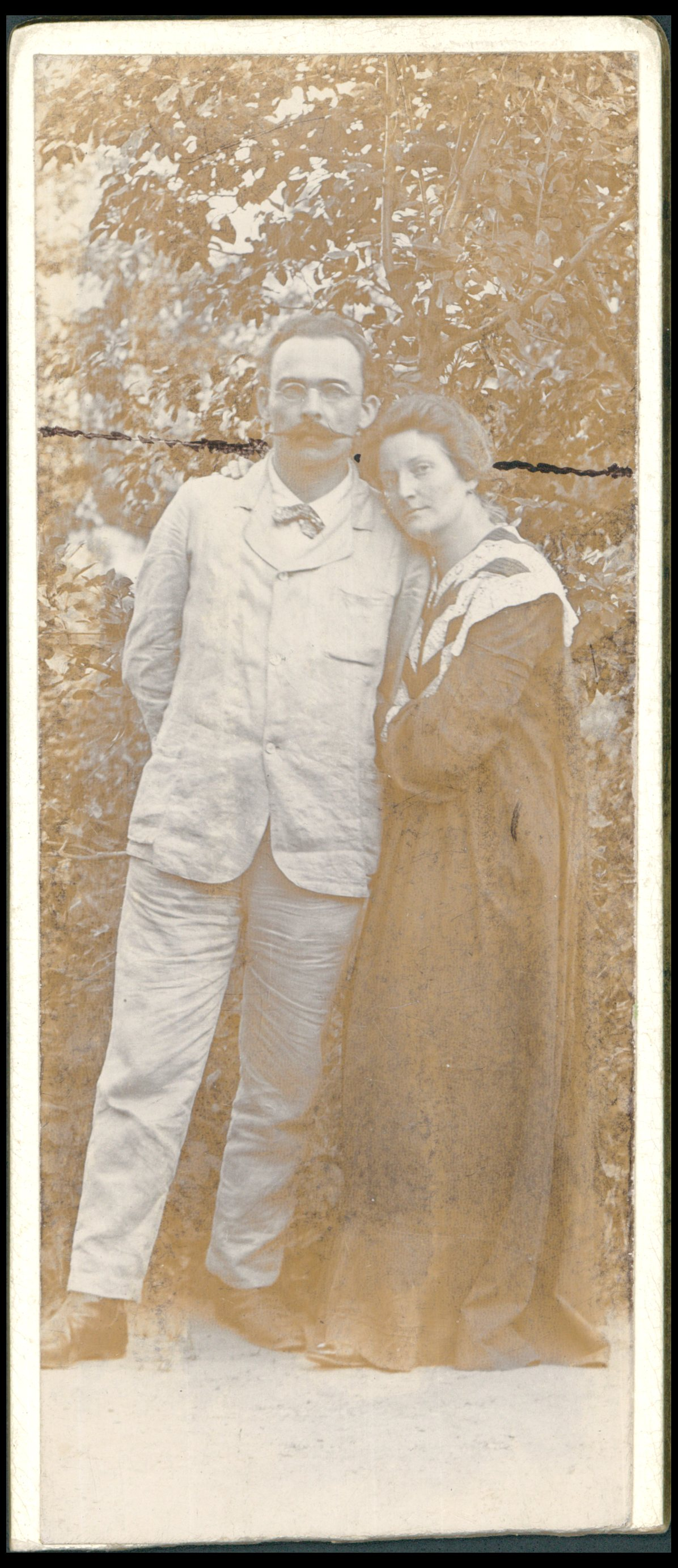 Kazimierz Kelles-Krauz z żoną, ok. 1903 r.